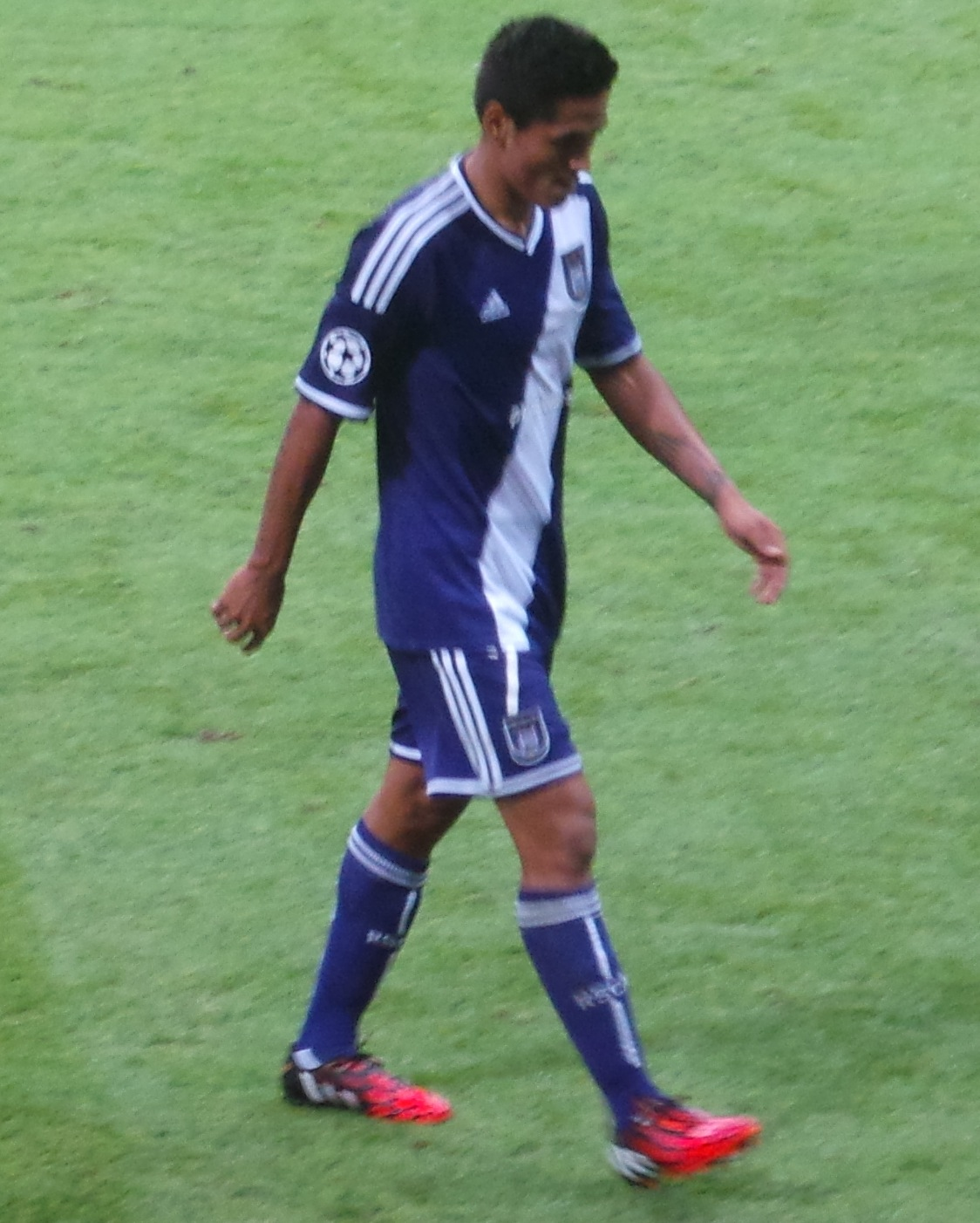 Andy Najar with Anderlecht